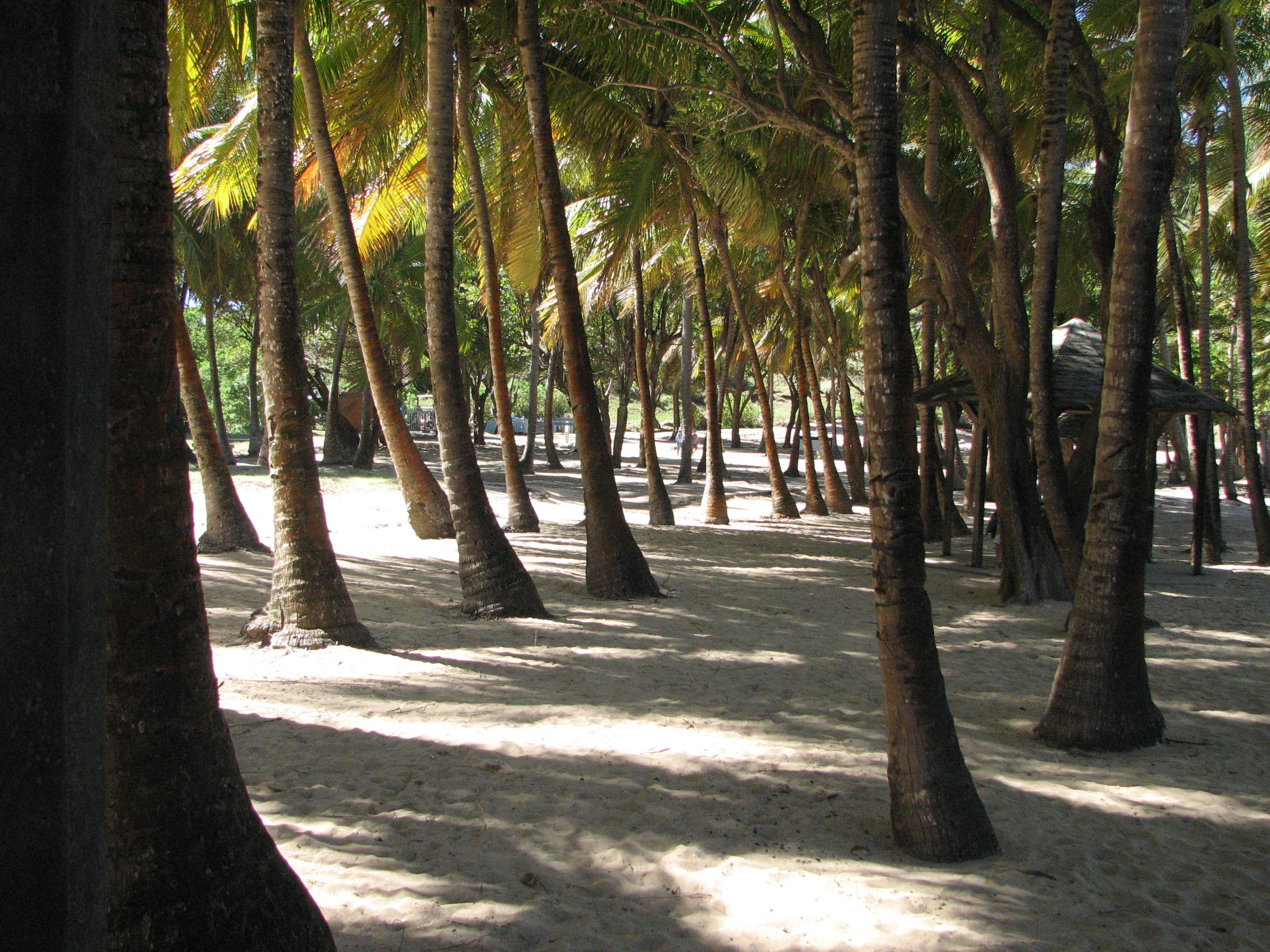 Plage et baie de Pompierre, à Terre-de-haut (Les Saintes, Guadeloupe).